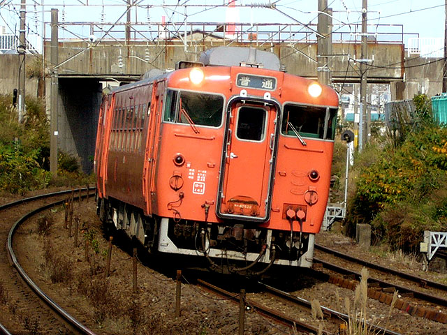 奥羽本線、土崎～秋田貨物間にて daigo35が撮影